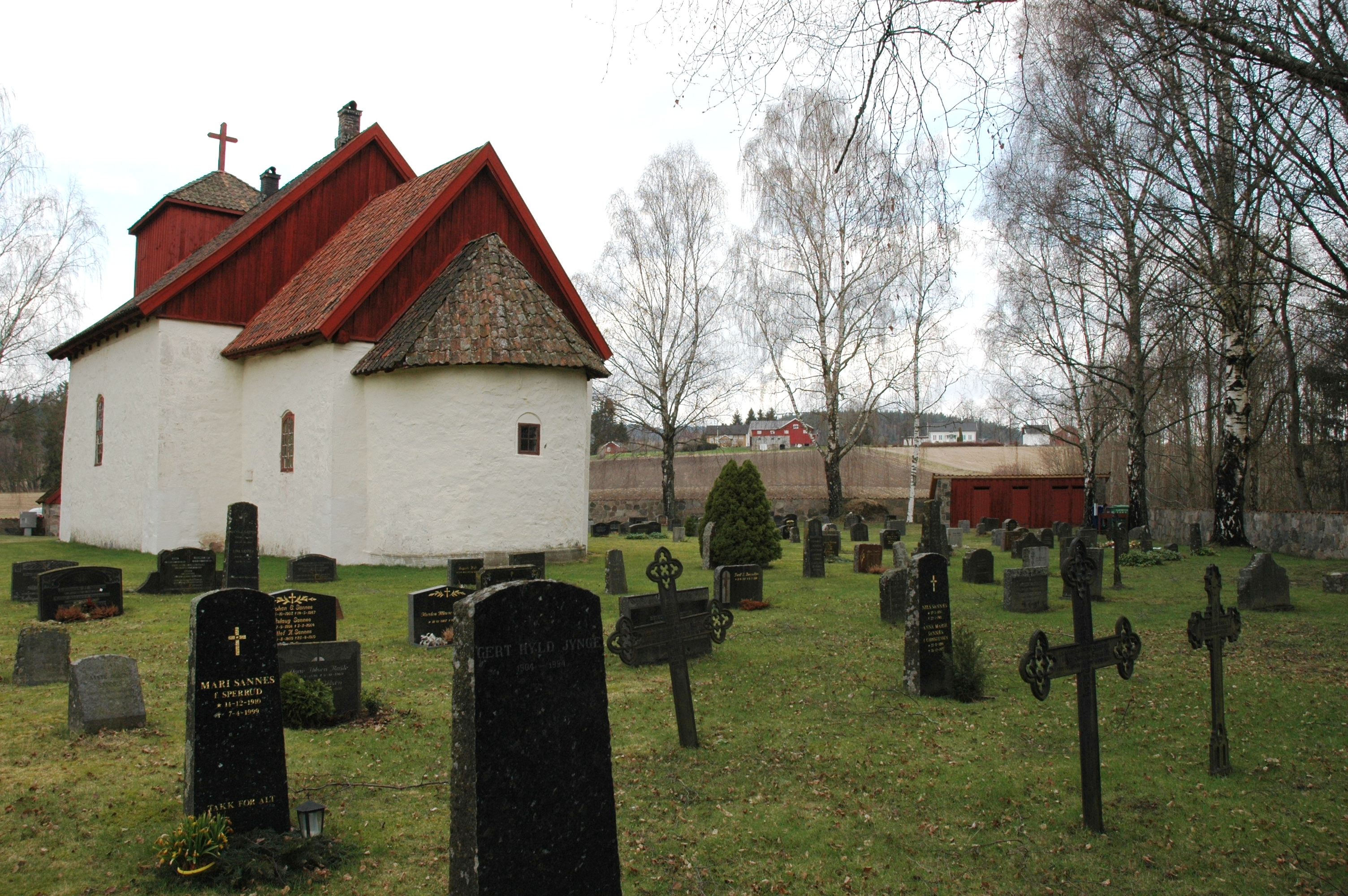 Romnes kirke er ei steinkirke fra 11-1200 tallet og ligger vakkert til nær Norsjø i Nome